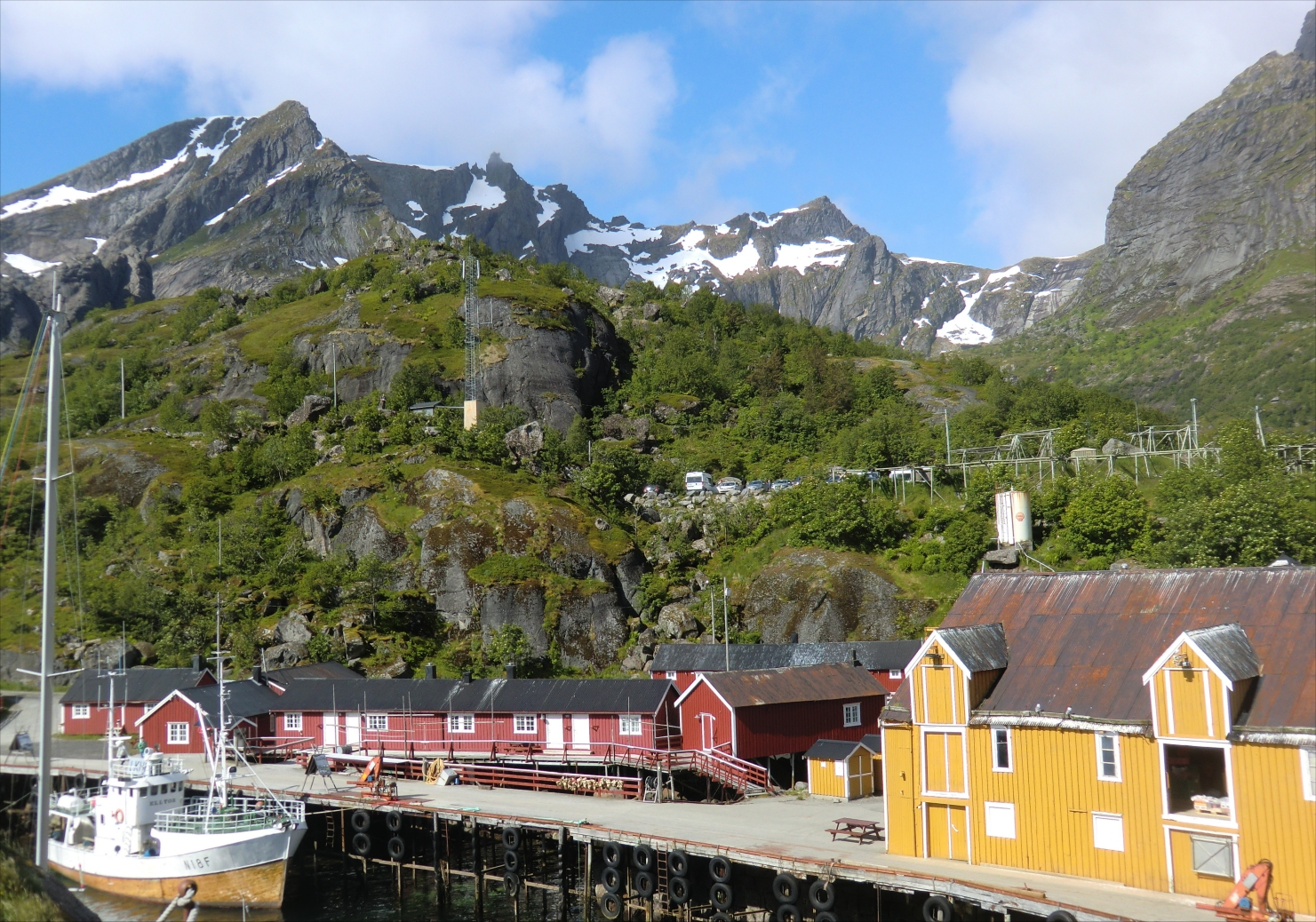 Nusfjord juli 2015